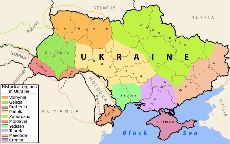 Regions historiques en Ukraine